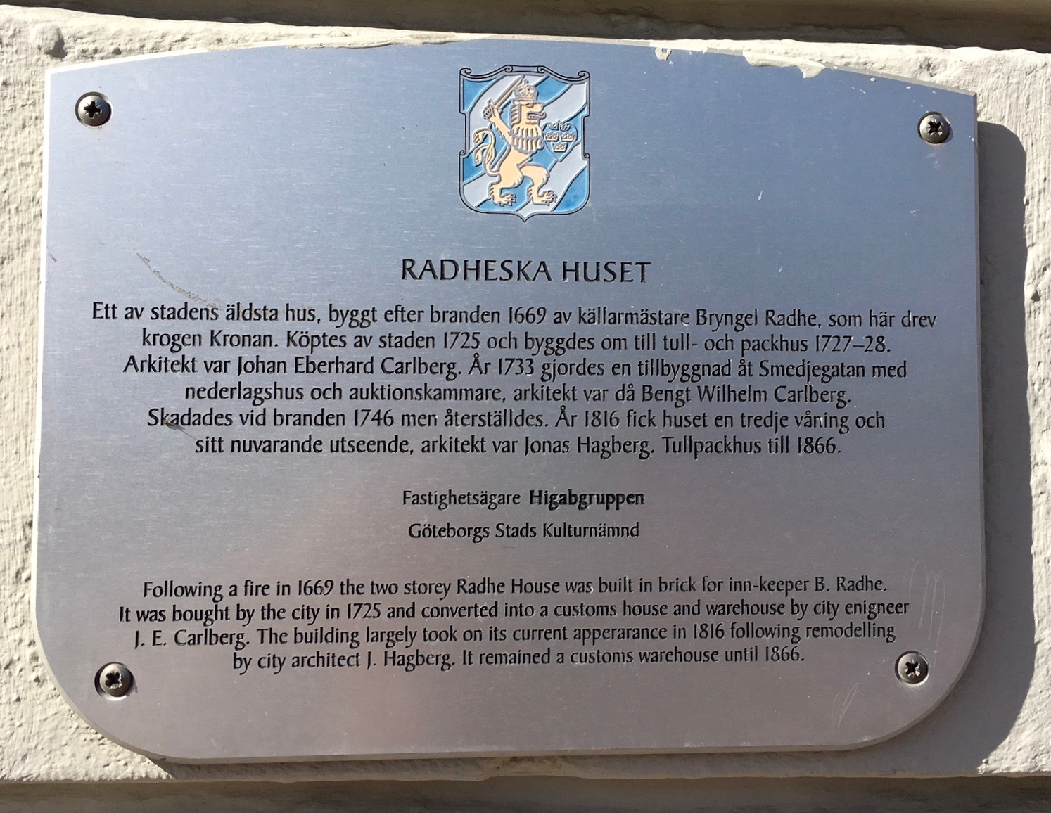 Plakett på Radheska huset vid Norra Hamngatan 10 i Göteborg. Plaketten sattes upp som en del av Göteborgs stads kulturnämnds "Projekt Husmärkning" kring åren 2000-2001 där drygt etthundra skyltar ingick. Se även boken "100 utmärkta hus i Göteborg". Vid den inventering, som kommunen gjorde 2016, satt fortfarande 69 skyltar uppe.